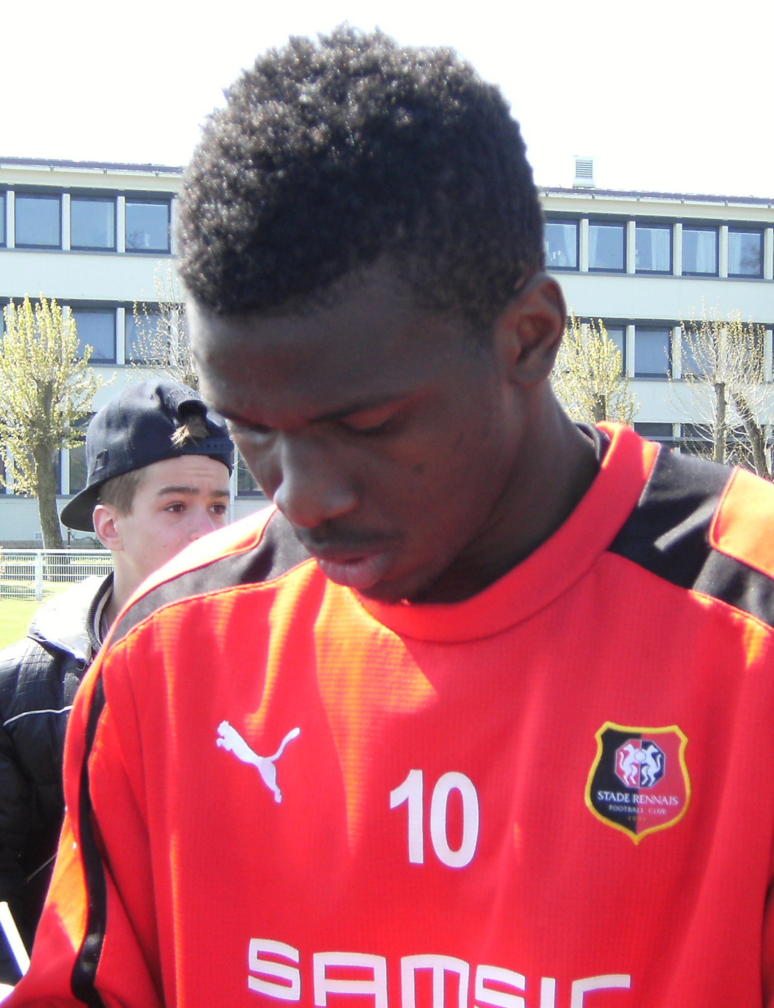 Photo prise lors d'un entraînement du Stade rennais au stade de Marville de Saint-Malo le 3 mai 2013. Sadio Diallo répond aux sollicitations des supporters.